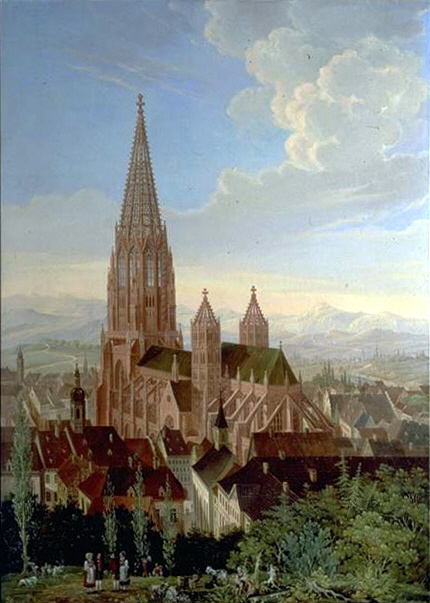 Blick vom Schlossberg auf die Stadt Freiburg im Breisgau mit dem Münster. Teilkopie nach dem Stahlstich von Gay. Öl auf Leinwand. 1839. 176.5 cm x 123.3 cm Aus dem 1966 abgerissenen Haus zum Sonnenbühl, Rämistr. 48, Zürich.